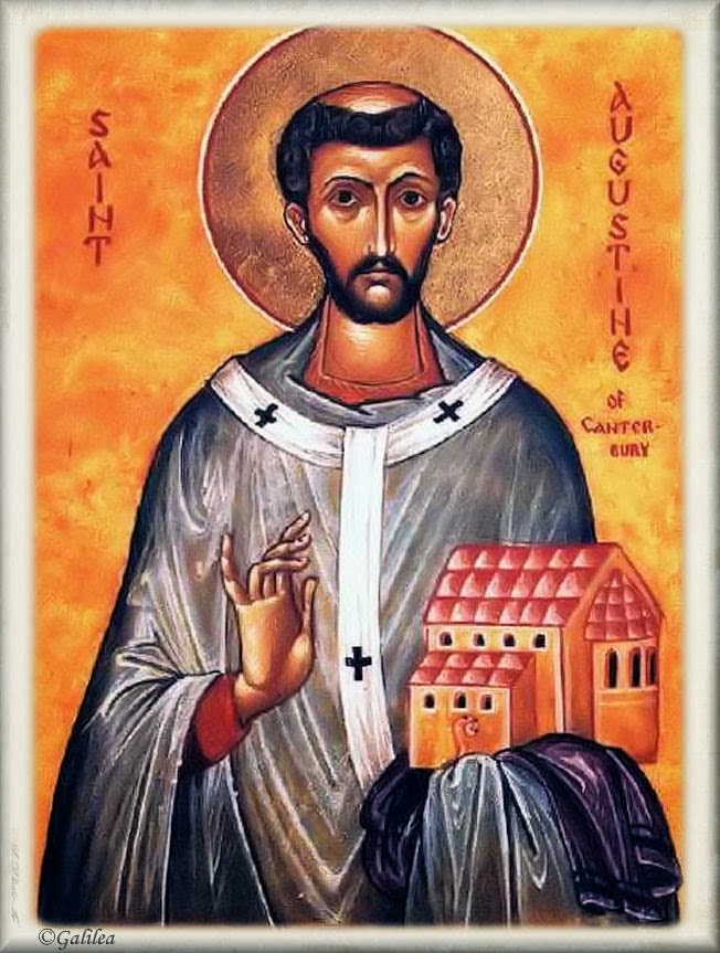 Augustinus von Canterbury